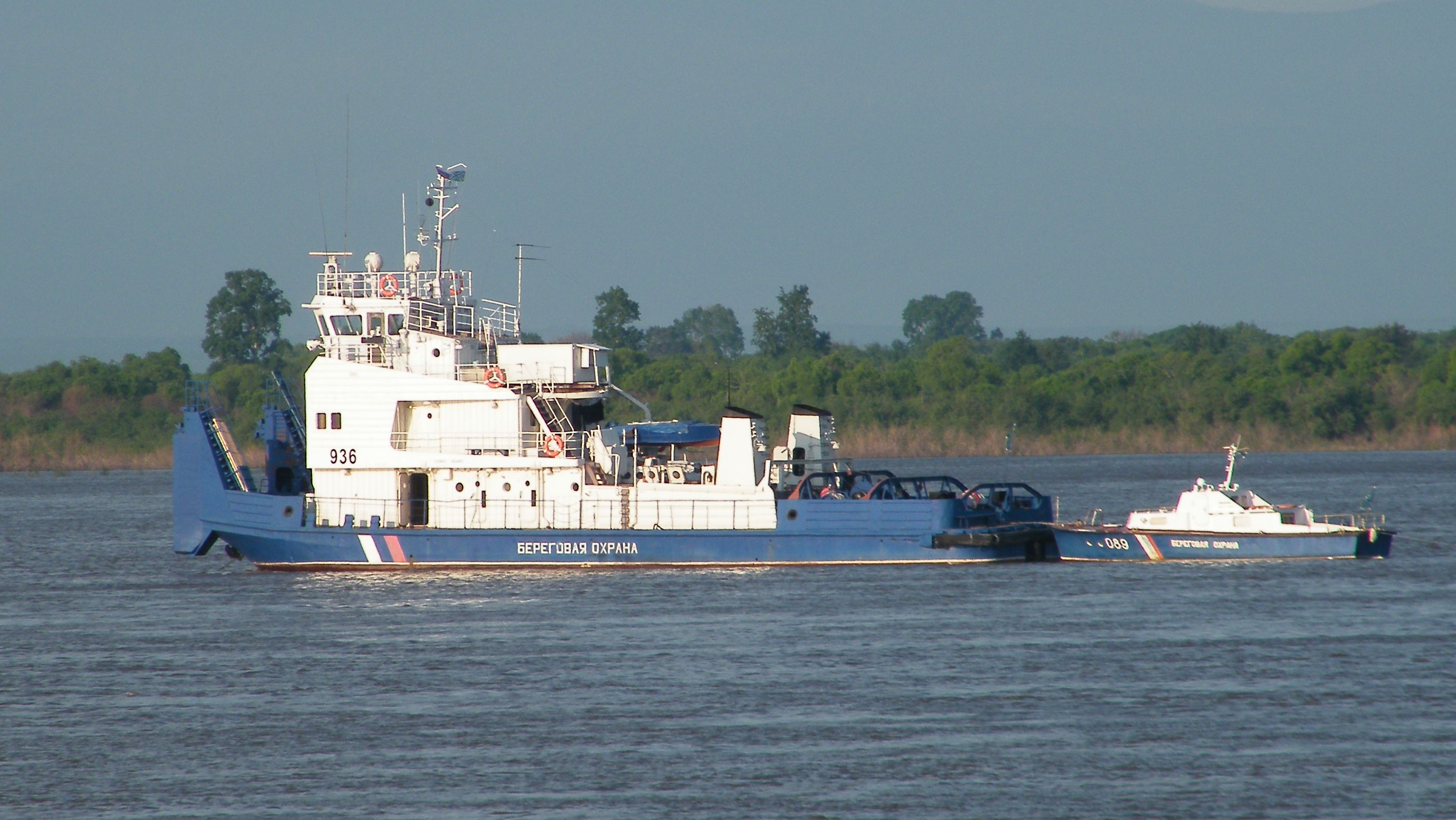 Буксир Амурской флотилии